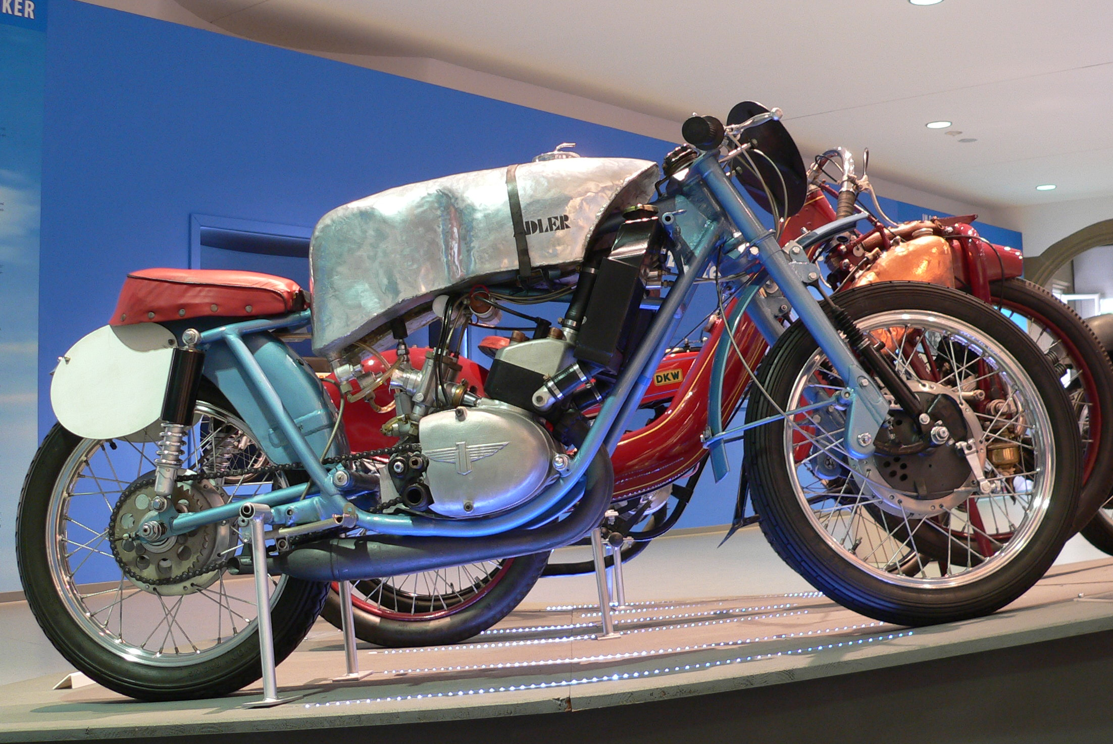 Motorbike "Adler MB 250 RS" (1955) at the Deutsches Zweirad- und NSU-Museum (248 cm³, 28 PS bei 8.000 U/min., 175 km/h)